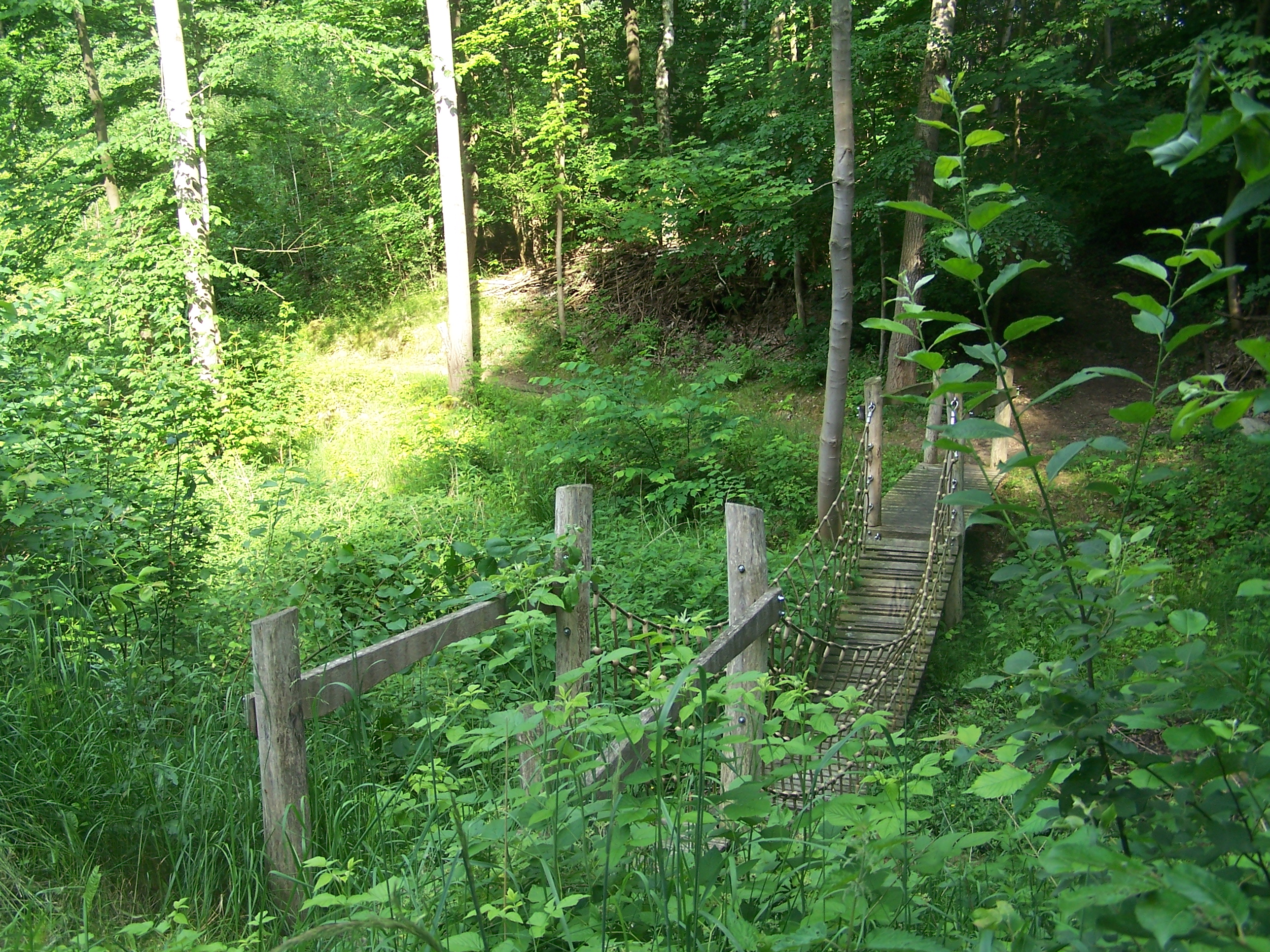 Lehrpfad in der Tongrube Hellberg in der Nähe von Dobbertin - Hängebrücke